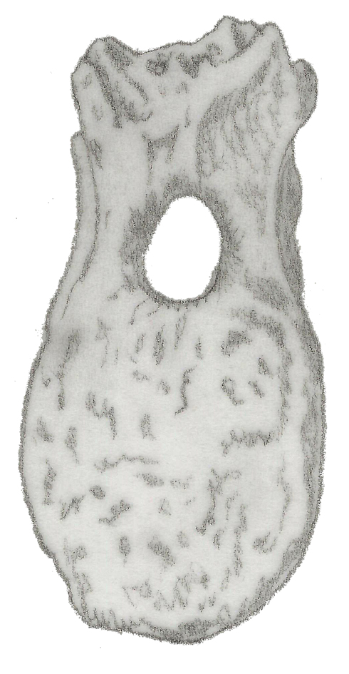 Illustration of a fossil of Cionodon